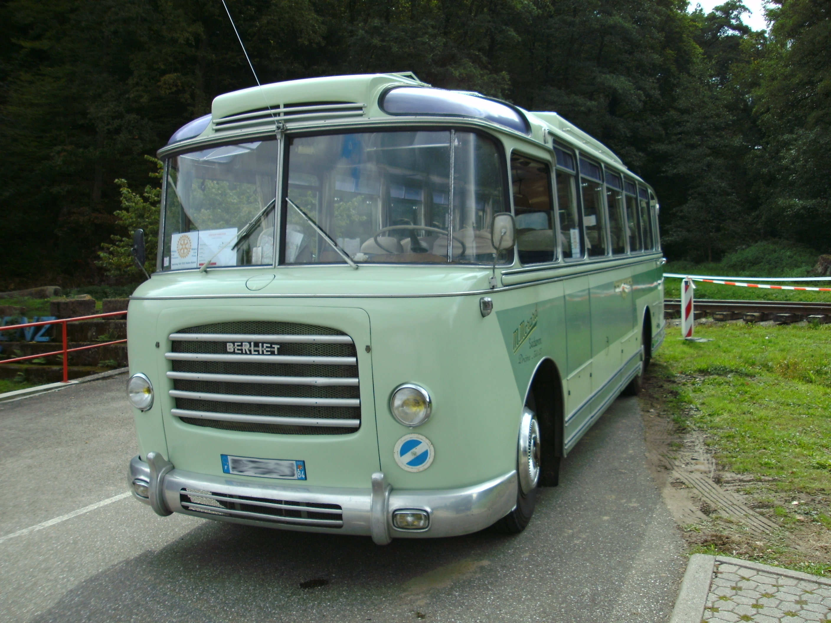 Berliet PLB, Baujahr 1956, 125 PS